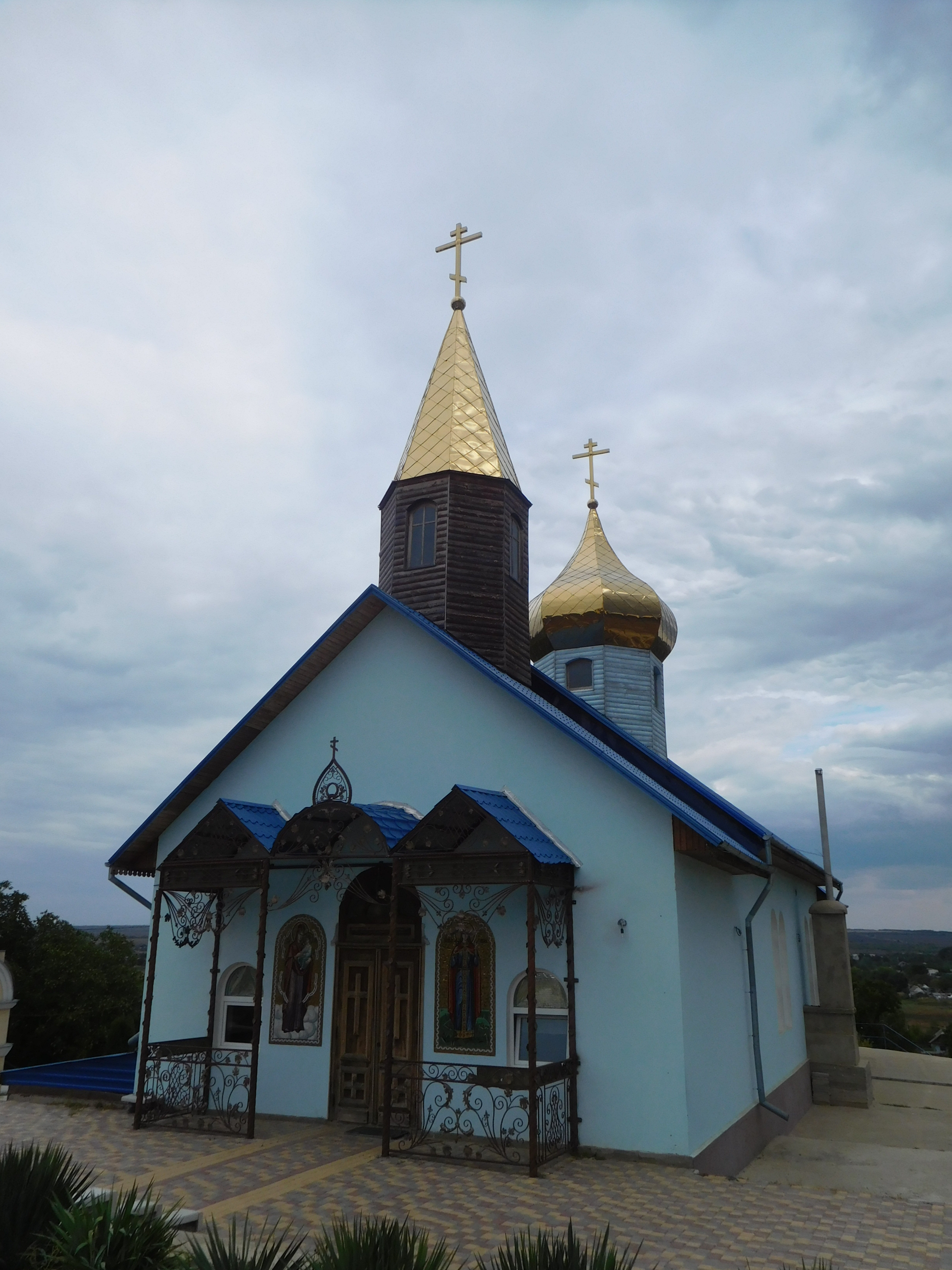 Церква ікони Божої Матері "Споручниця грішних" в с. Новокрасне, Роздільнянський район, Одеська область. Вікіекспедиція Північ Одещини